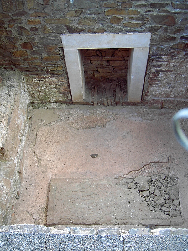 Römergrab bei Nehren (Mosel)